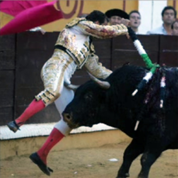 Peligrosidad de las corridas de toros